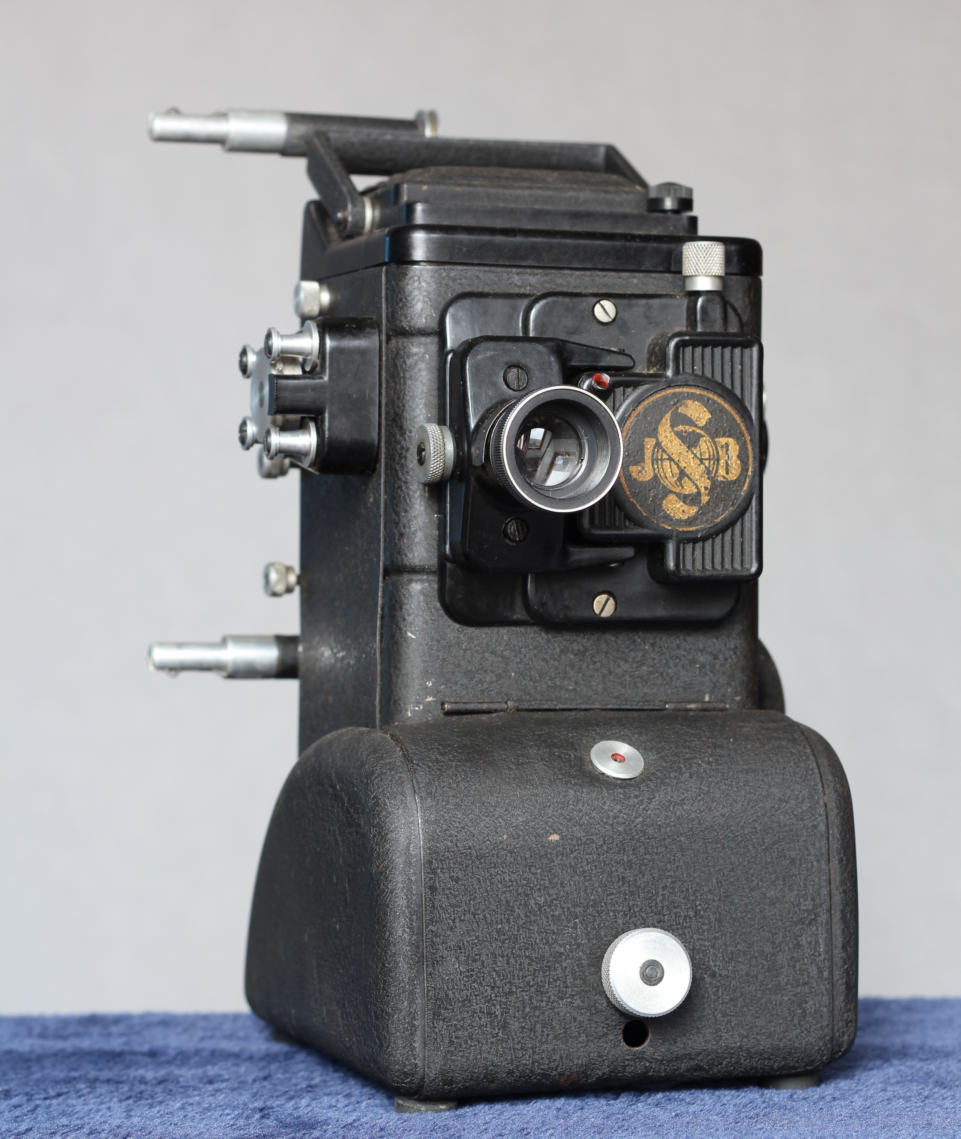 Projektor (promítačka) vyráběná firmou Jindřich Suchánek, Brno, nazvaná Atom, pohled na přední stranu s objektivem a znakem firmy a na filmovou dráhu.